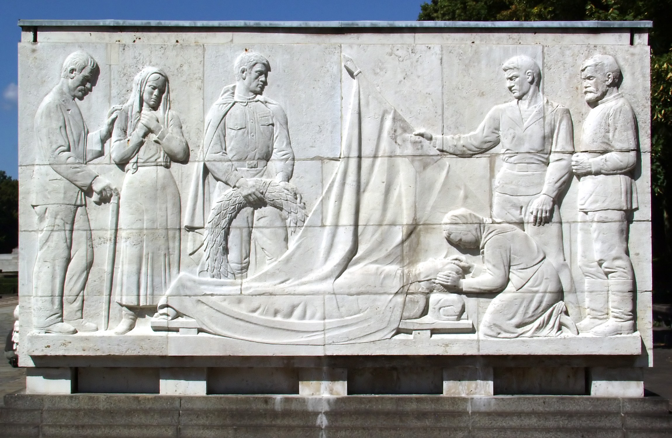 Sowjetisches Ehrenmal im Treptower Park, 8. Sarkophag von Nordwesten in der nördlichen Reihe, Relief an der Südostseite.